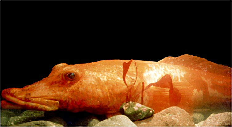 Parachaenichthys charcoti, captured at Potter Cove, King George I., South Shetland Is., Antarctica